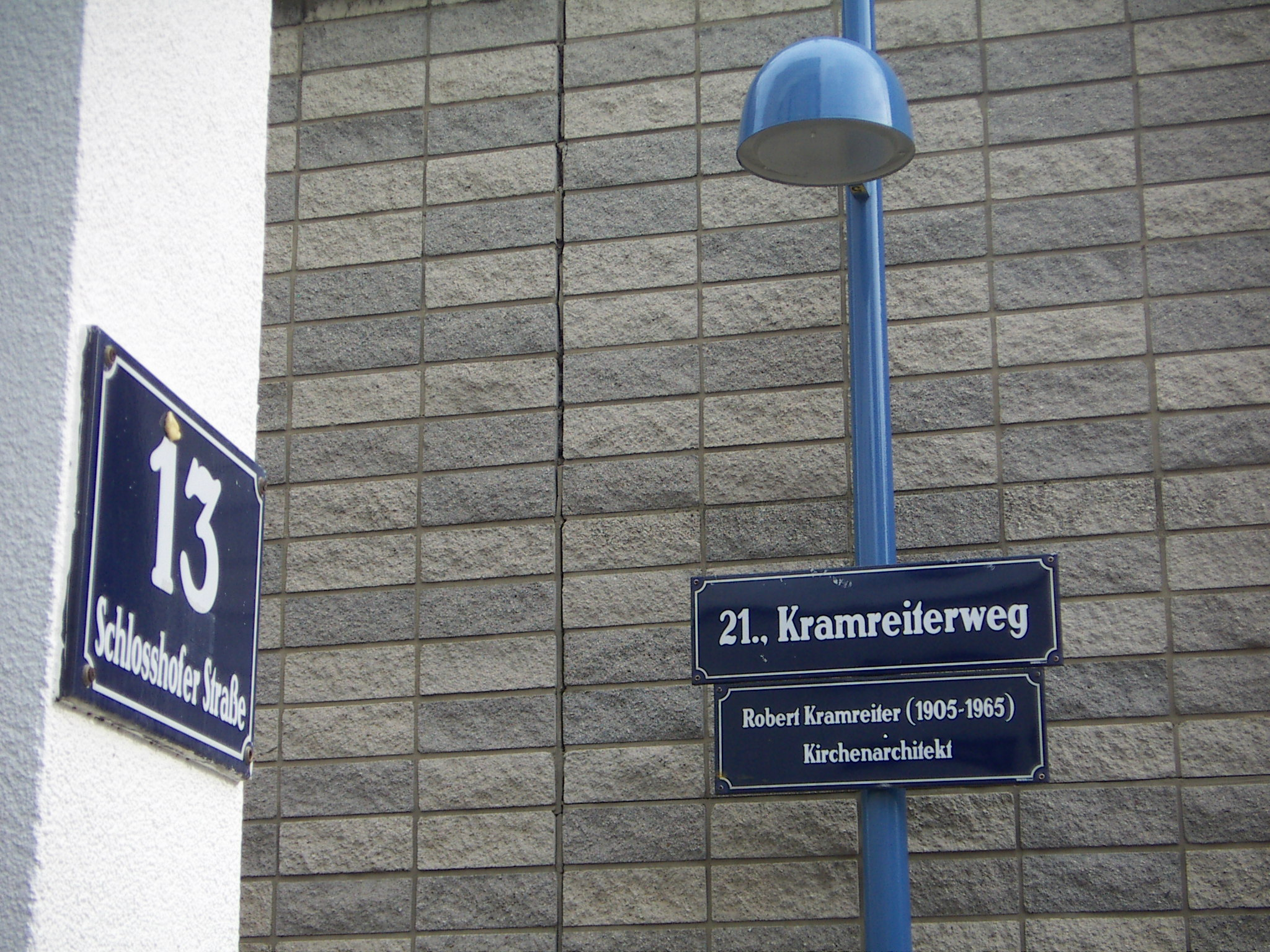 Kramreiterweg, in Floridsdorf, benannt nach Architekt Robert Kramreiter